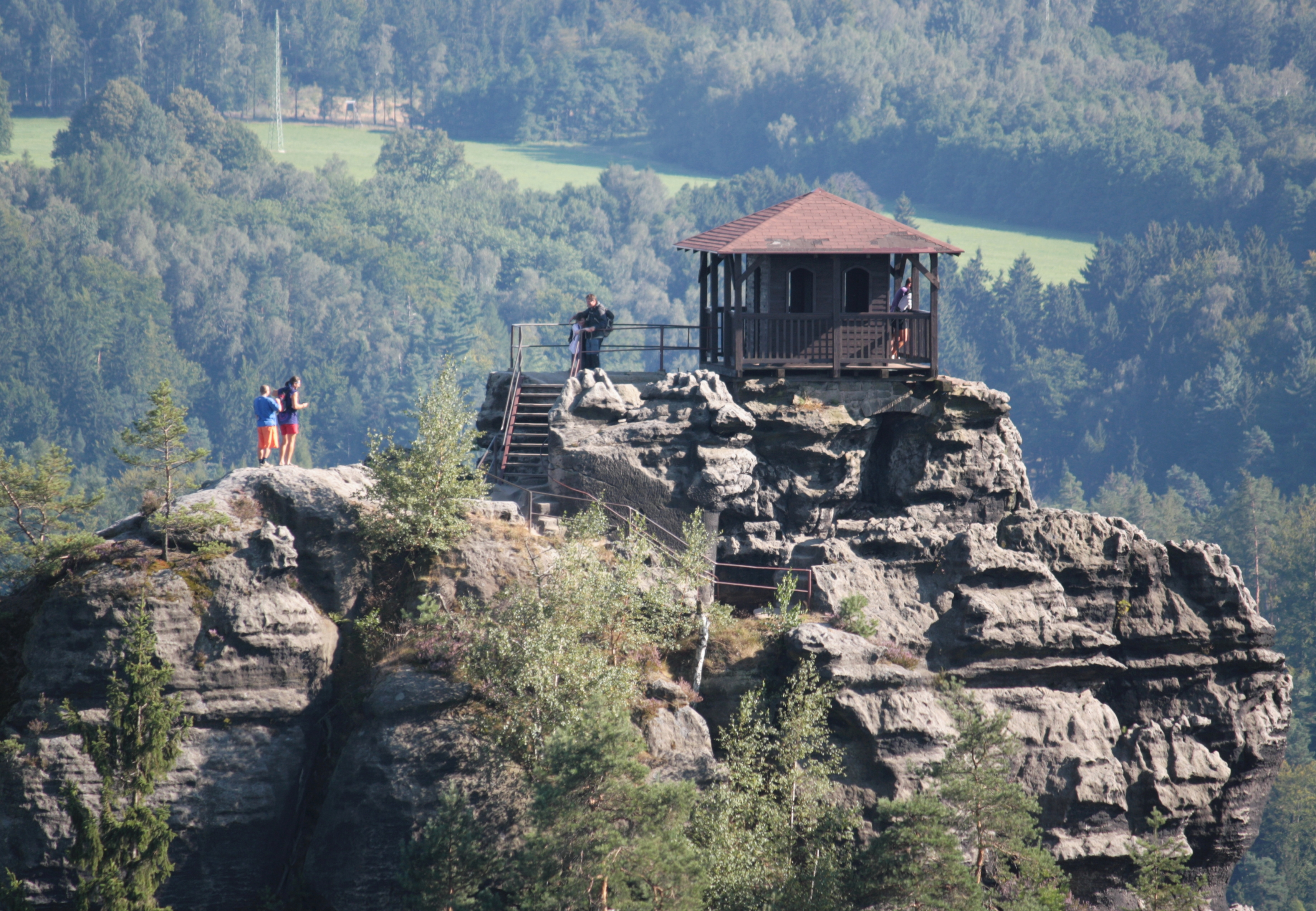 Mariina skála - pohled z vyhlídky na Vilemínině stěně